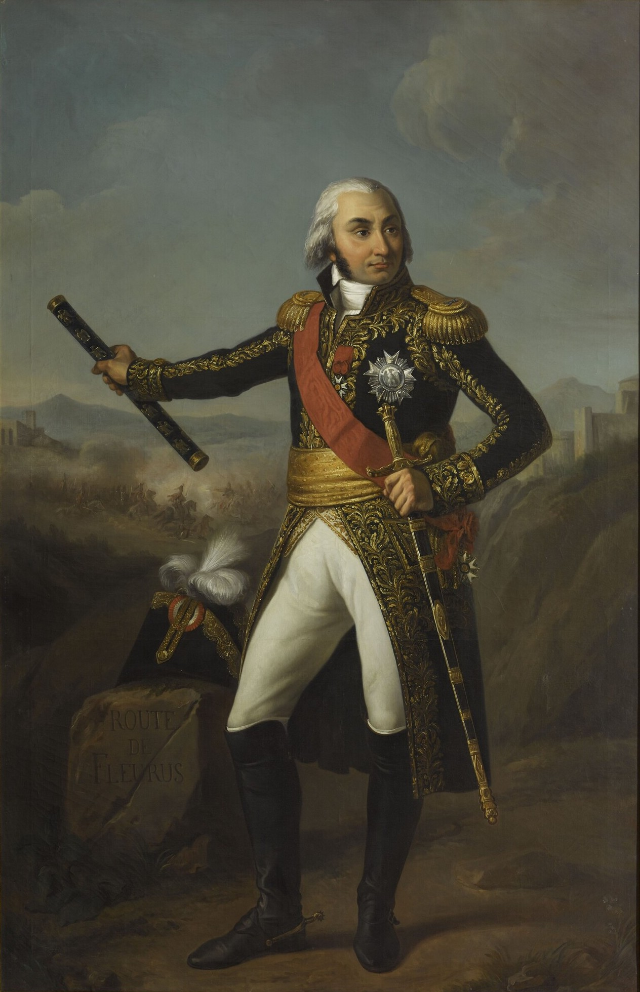 Le maréchal d'Empire Jean-Baptiste Jourdan posant aux côtés d'une pierre indiquant la route de Fleurus, où il remporta sa plus grande victoire. Copie d'après un original de Vien commandé par Napoléon Ier pour la salle des maréchaux du palais des Tuileries à Paris, détruit dans l'incendie de 1871